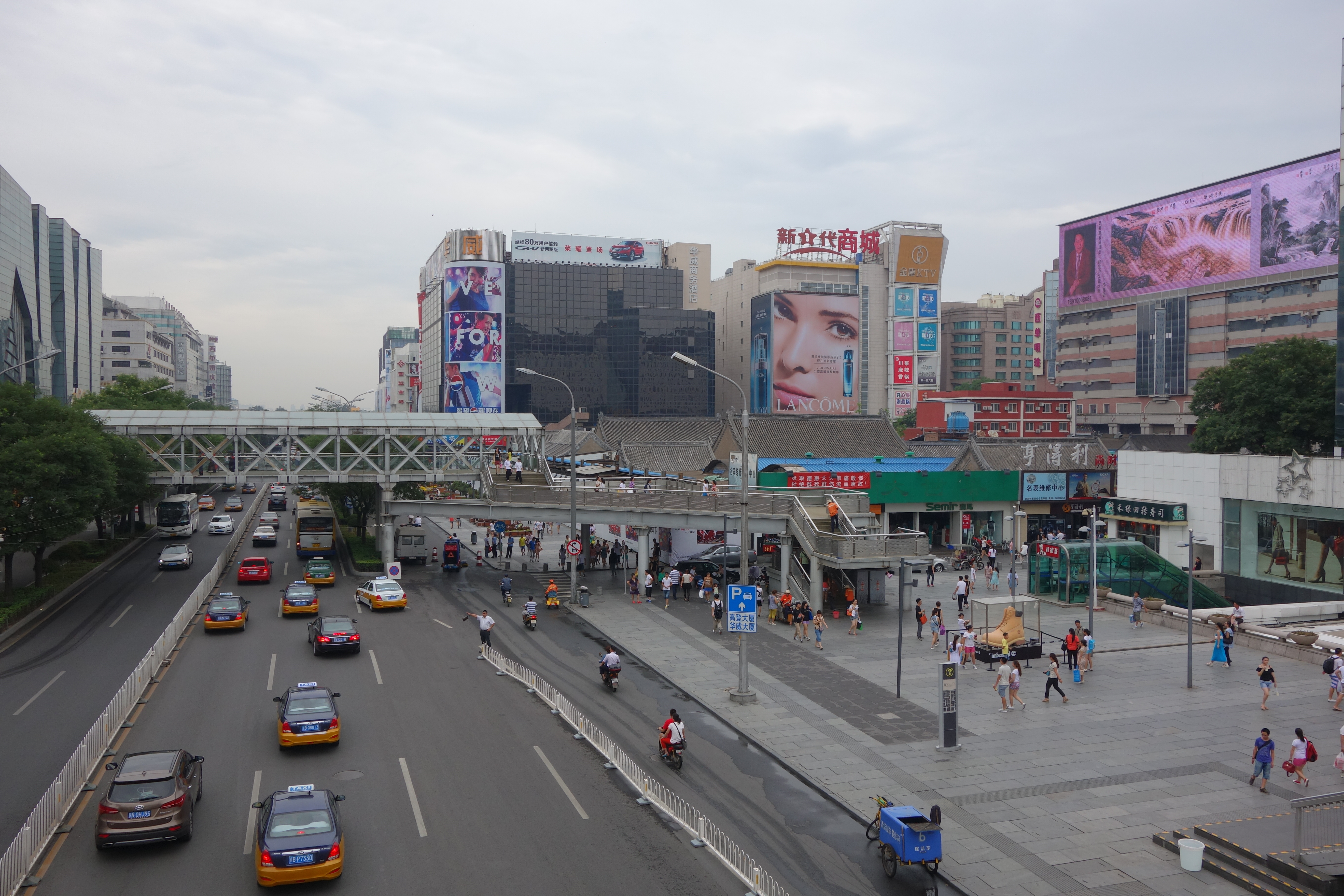 西单 xi dan